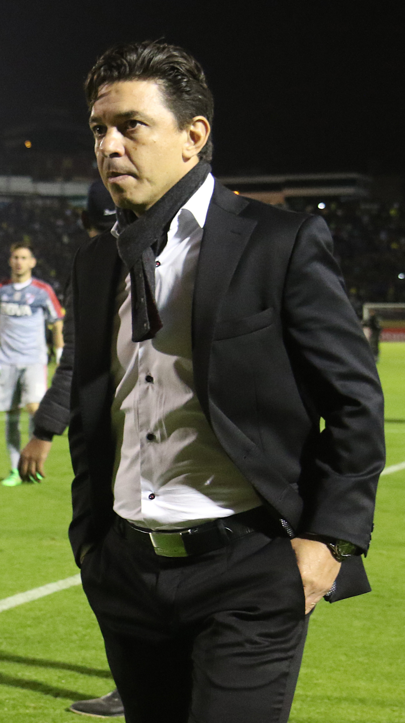 Quito, 28 abr (Andes).- Ante más de 35.000 personas entre hinchas del Independiente, Barcelona, Liga de Quito, El Nacional, Emelec, la selección ecuatoriana, entre otros, Independiente del Valle derrotó 2-0 a River Plate de Argentina, actual campeón de la Libertadores, en los octavos de final del torneo continental. ANDES/Micaela Ayala V.